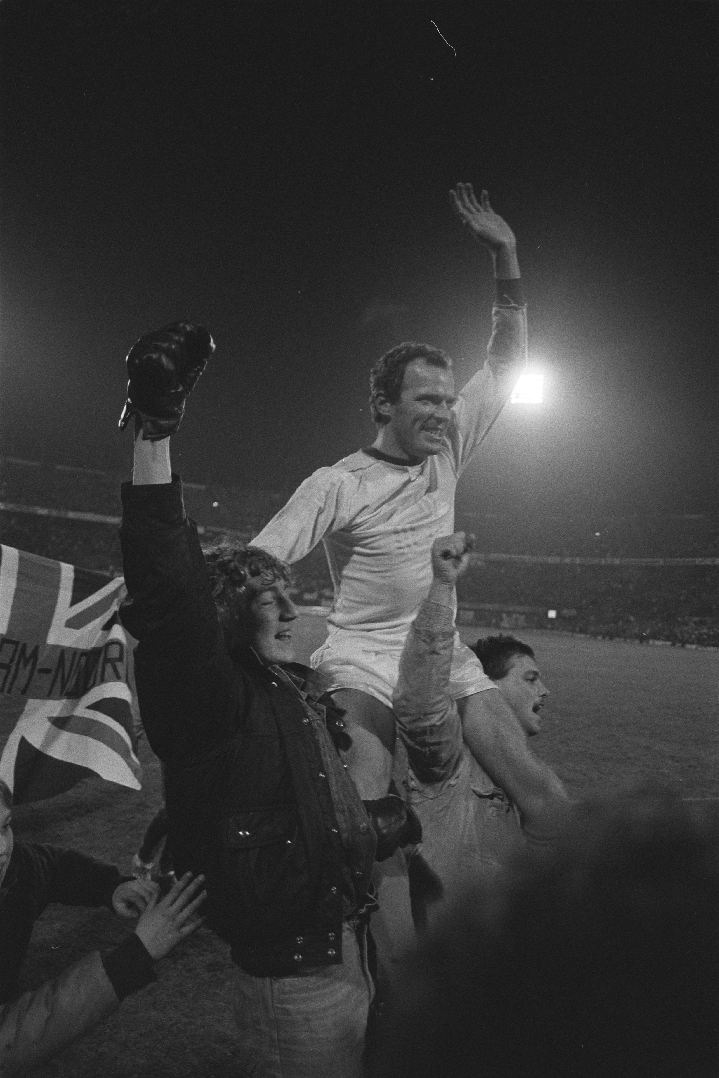 Collectie / Archief : Fotocollectie Anefo Reportage / Serie : [ onbekend ] Beschrijving : Nederland tegen Malta 5-0, voorronde EK-voetbal; Willy van de Kerkhof na afloop op de schouders van supporters Datum : 17 december 1983 Trefwoorden : sport, voetbal Persoonsnaam : Kerkhof, Willy van de, Malta Fotograaf : Antonisse, Marcel / Anefo Auteursrechthebbende : Nationaal Archief Materiaalsoort : Negatief (zwart/wit) Nummer archiefinventaris : bekijk toegang 2.24.01.05 Bestanddeelnummer : 932-8126